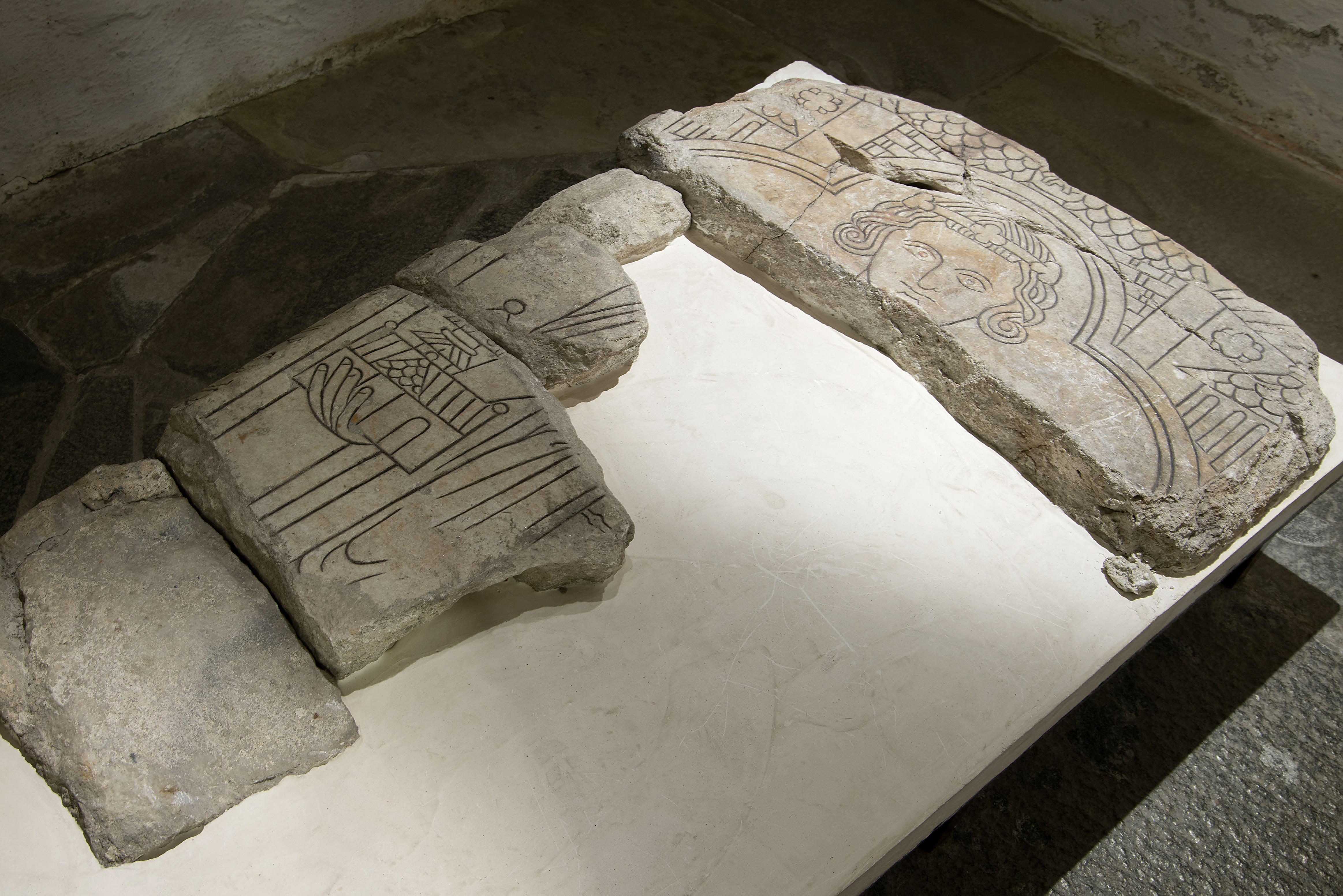 Trondheim har mye å by på, både gammelt og nytt. Norark.no har samla ni arkeologiske funn du absolutt ikke bør gå glipp av